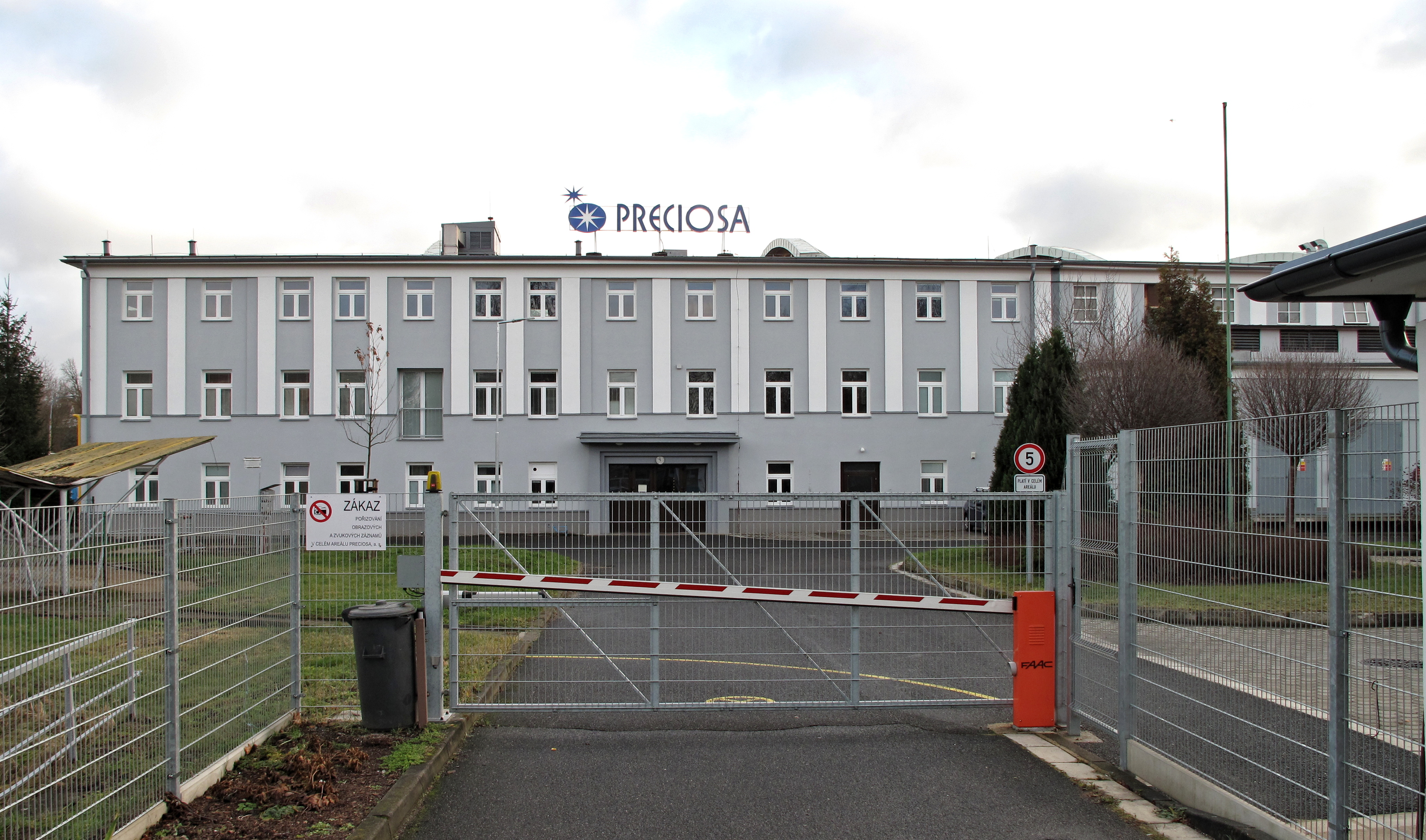 Objekty Prediosa v Jablonném v Podještědí.